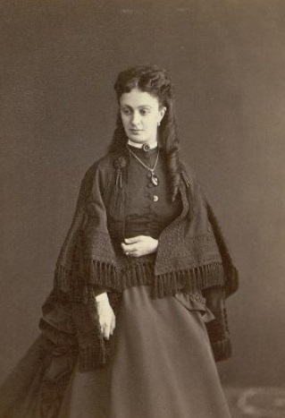 Екатерина Александровна Тимашева, ур. Пашкова (1830—1899)